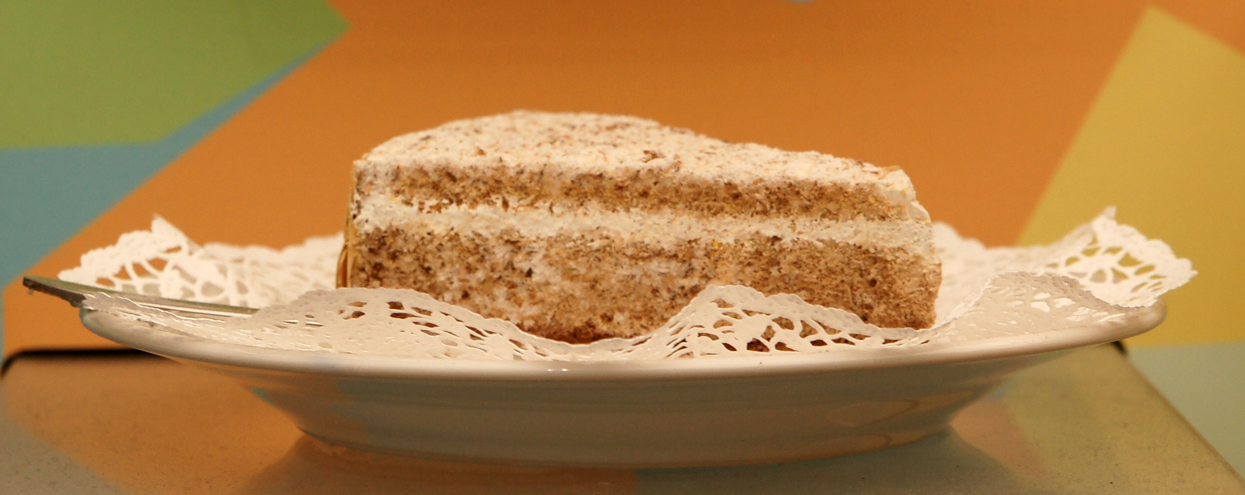 Solothurner Torte (Nachbildung, BEA Bern expo 2011)